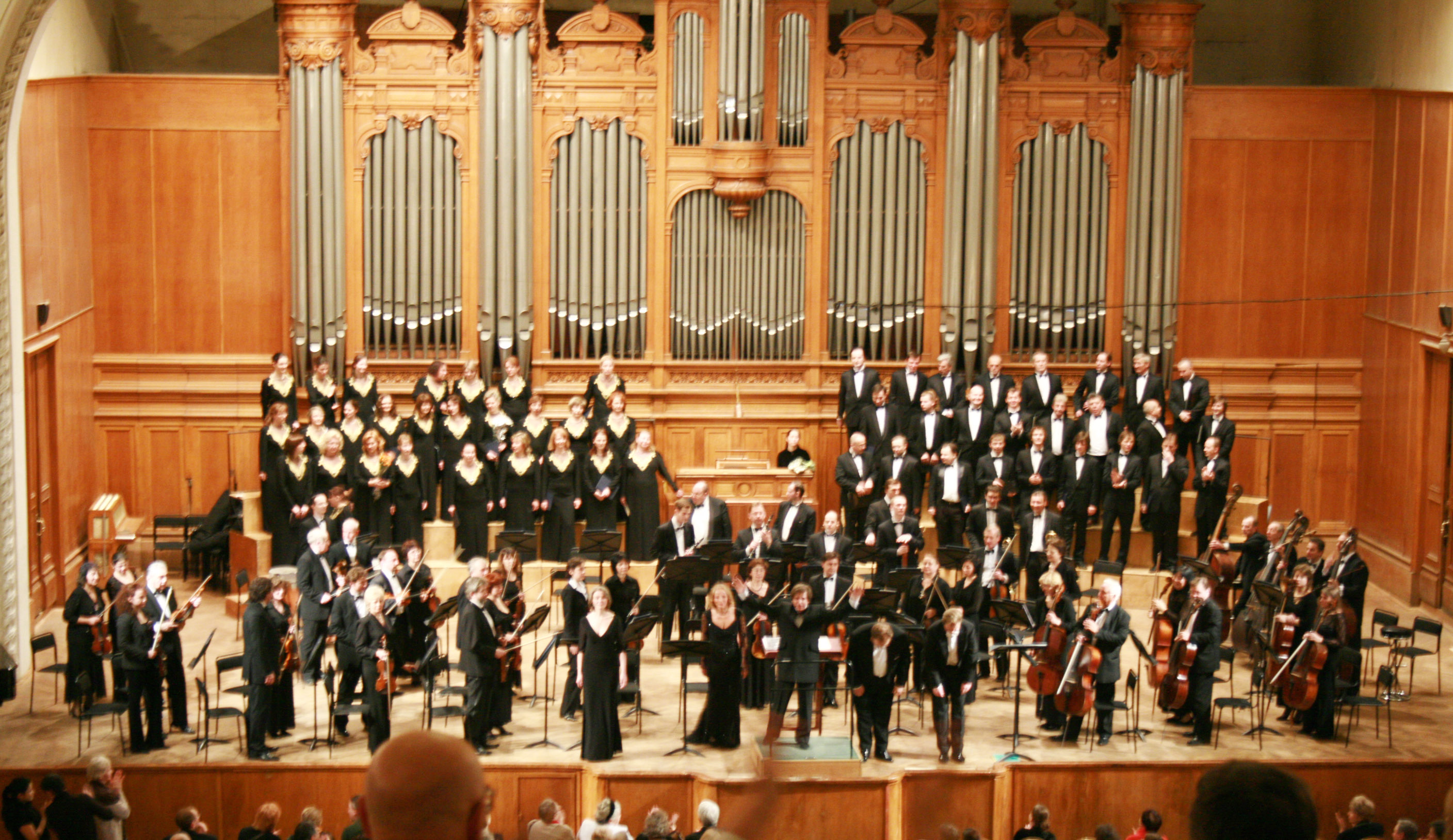 Московский симфонический оркестр и Государственная академическая хоровая капелла России имени А.А. Юрлова на сцене Большого зала Московской консерватории